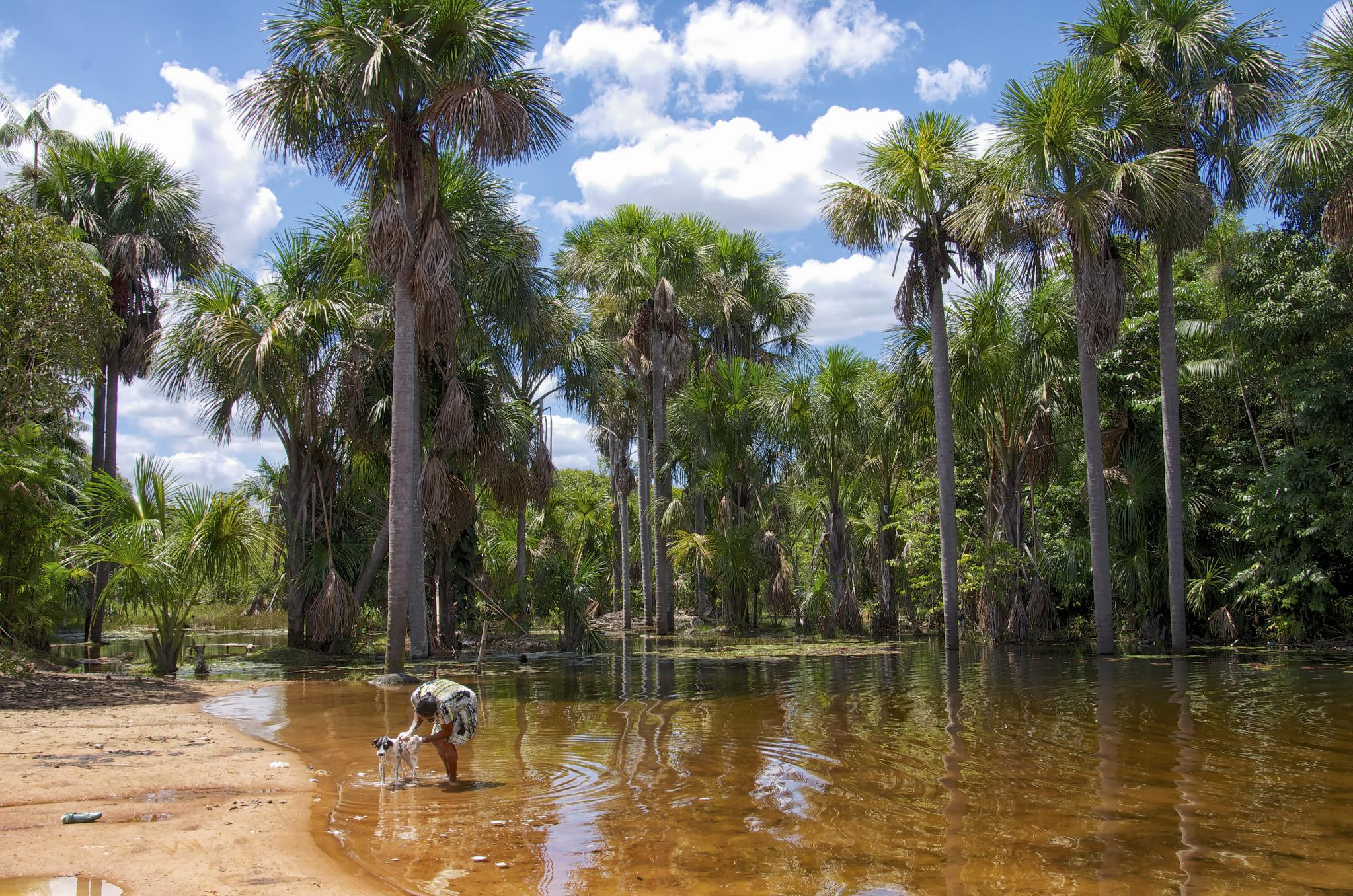 Águas do Maranhão